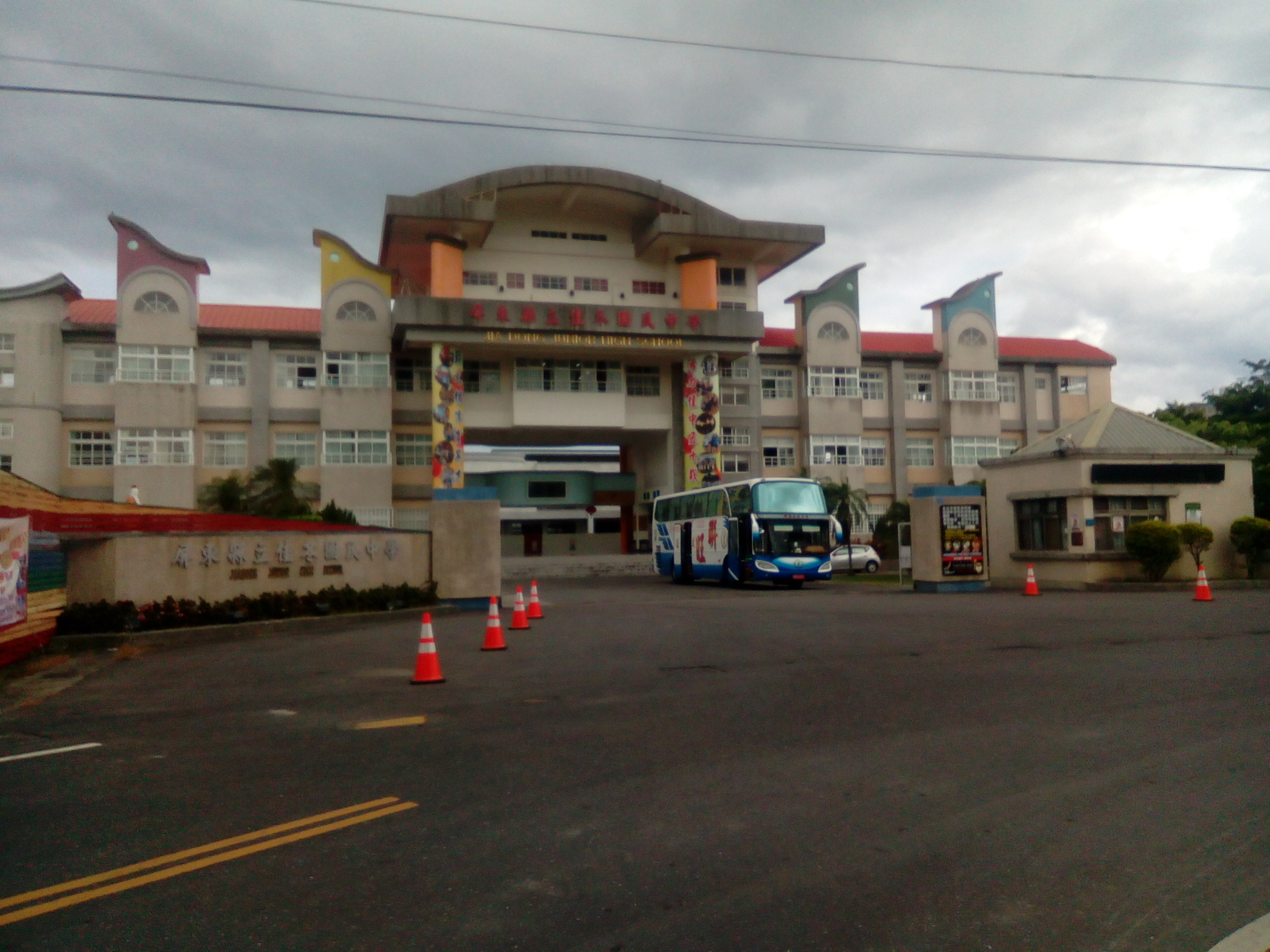 位於石光見聚落中